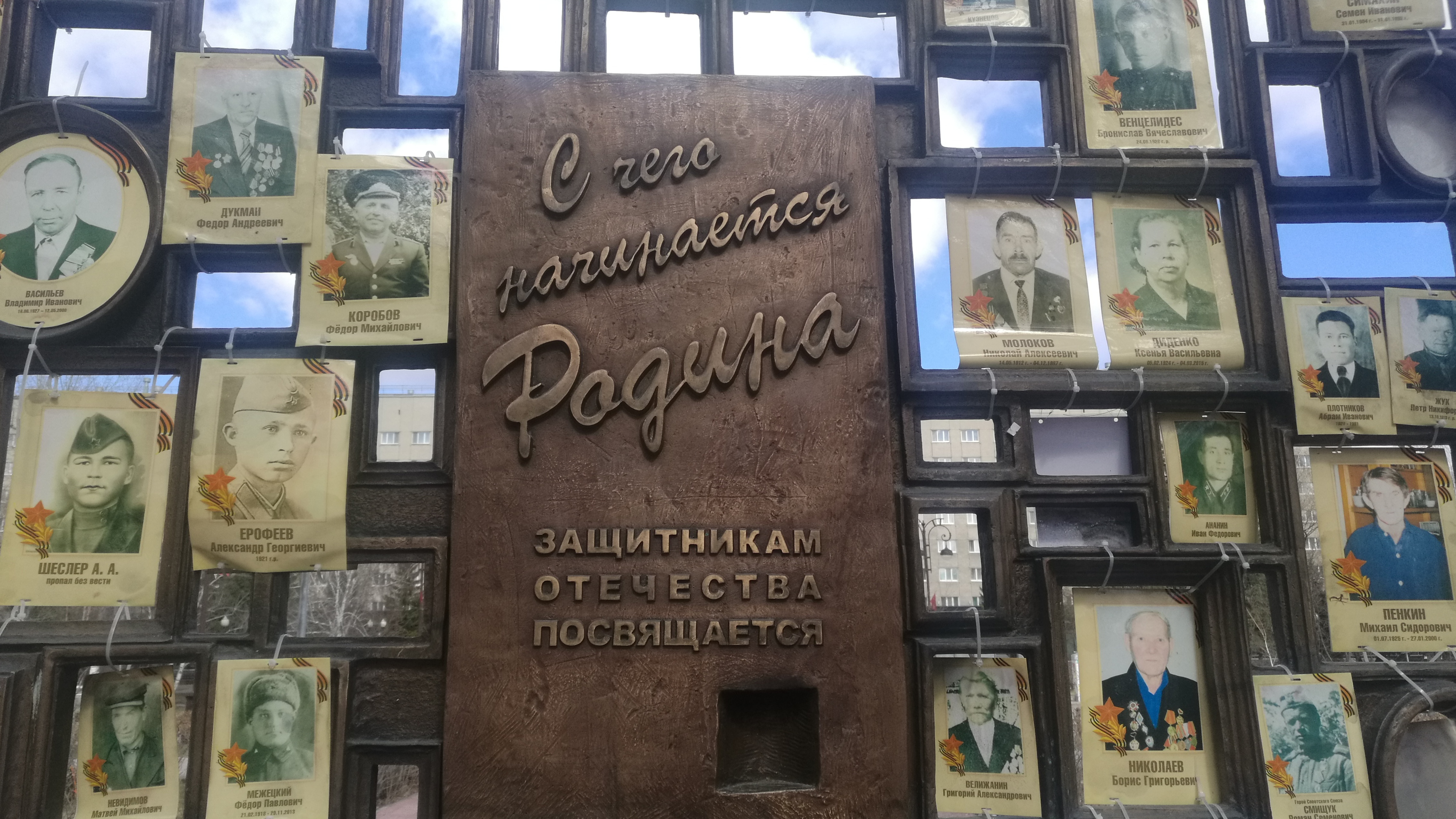 La monumento "De kio komenciĝas la patrujo". Tjumeno, Rusio.